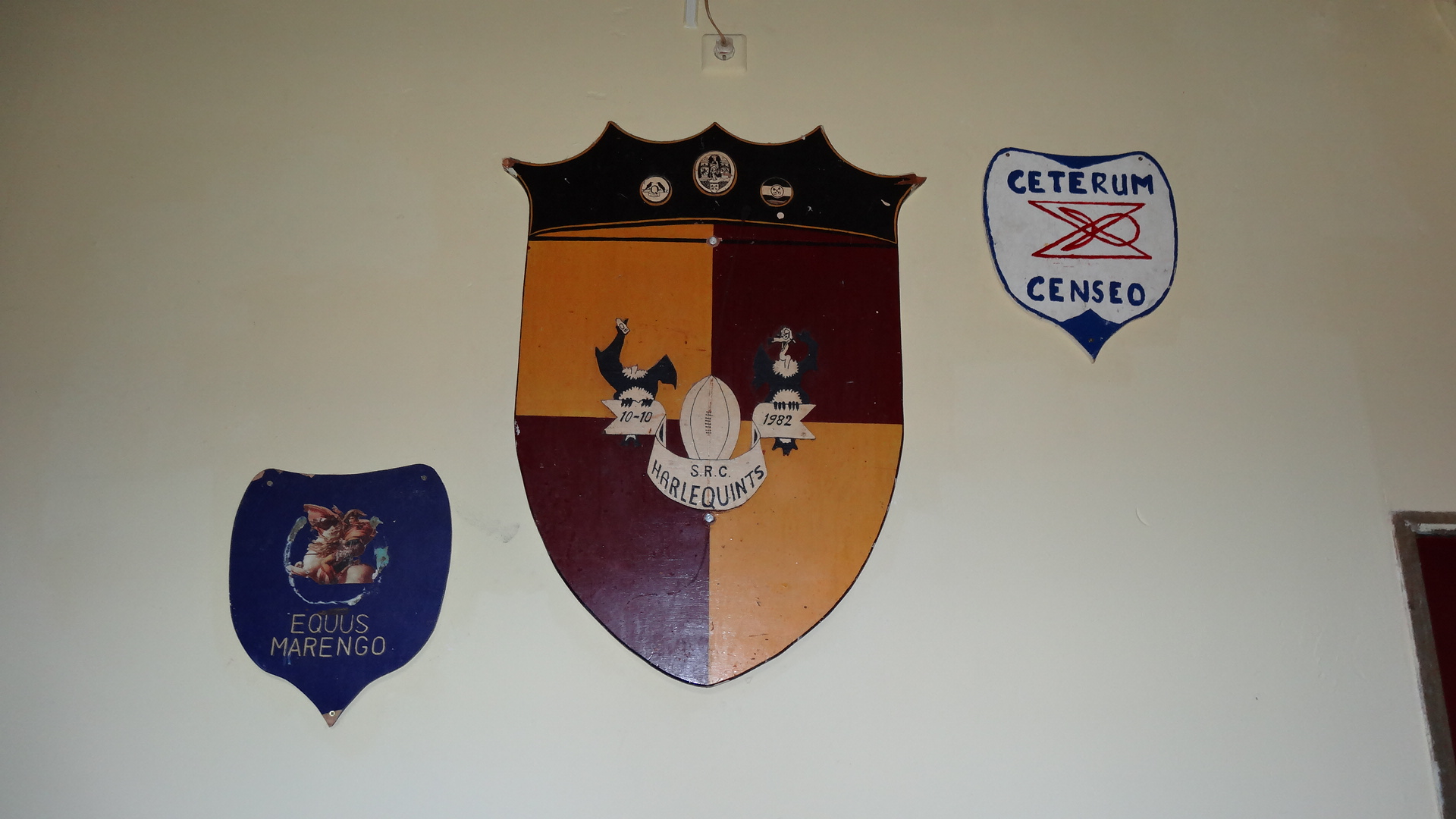 ALSV QUINTUS SUBVERENIGINGEN